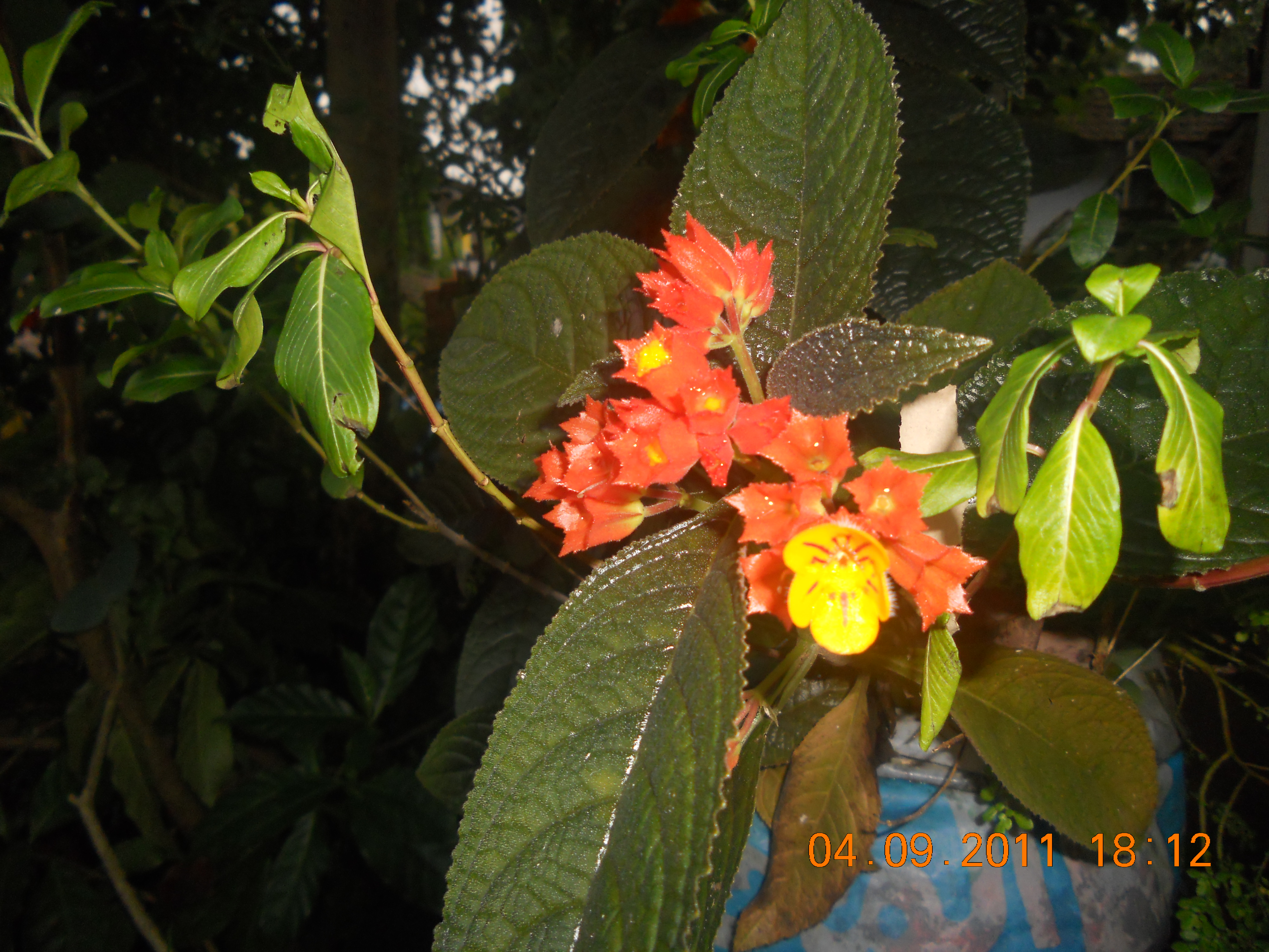 കമ്മൽപൂവ്